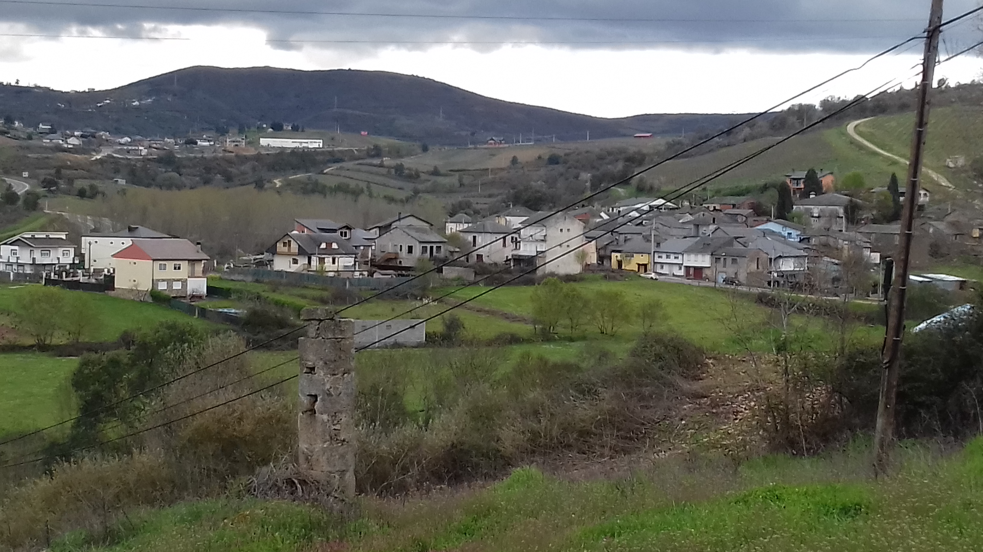 Vista xeral da aldea de Freixido, Freixido, Larouco